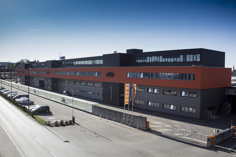 KTM Hauptwerk 2015 - Mattighofen